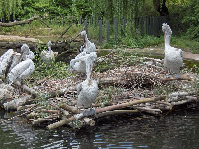 Species Pelecanus crispus Family Pelecanidae